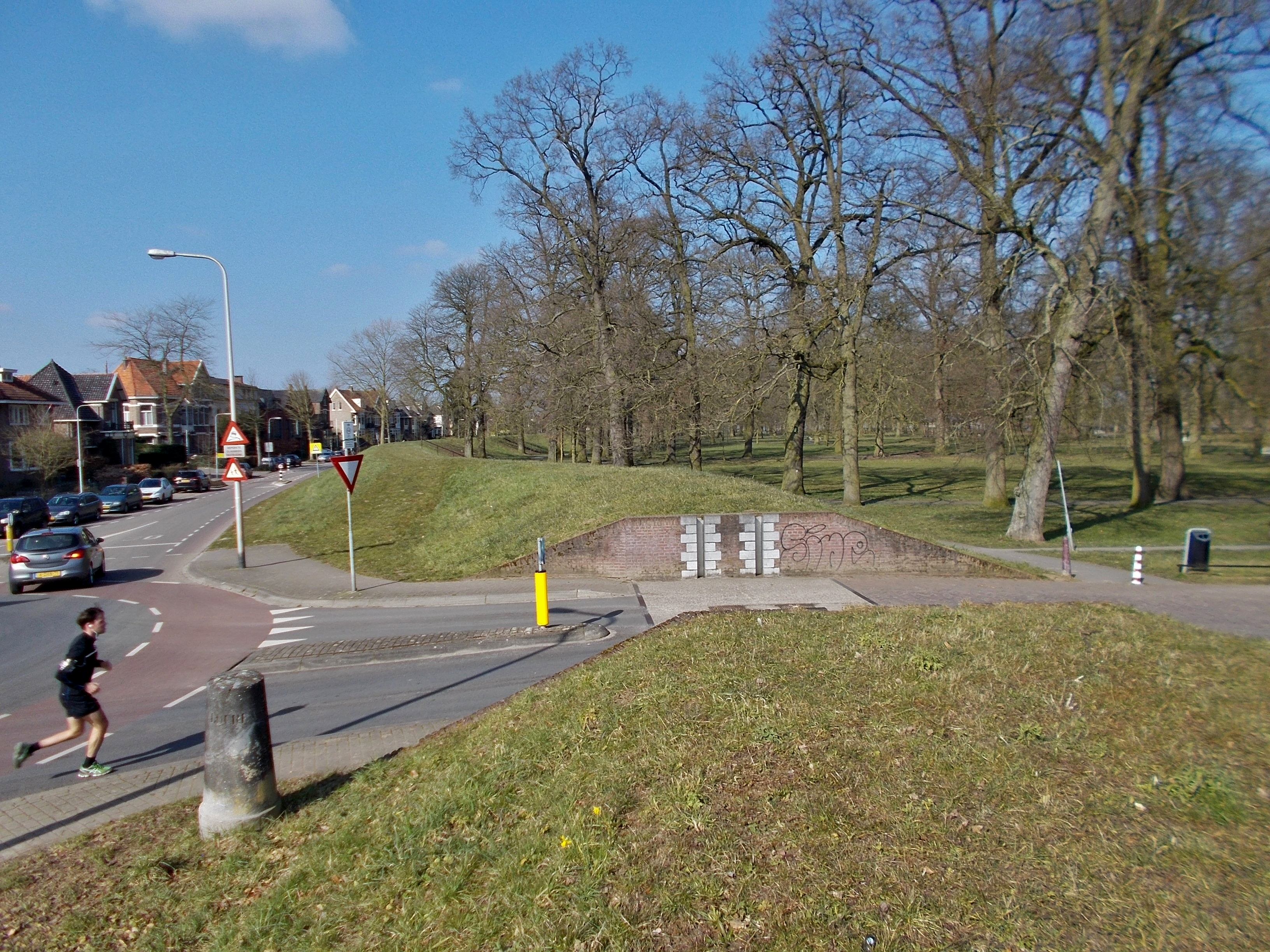 Coupure in de rivierdijk van de IJssel te Deventer